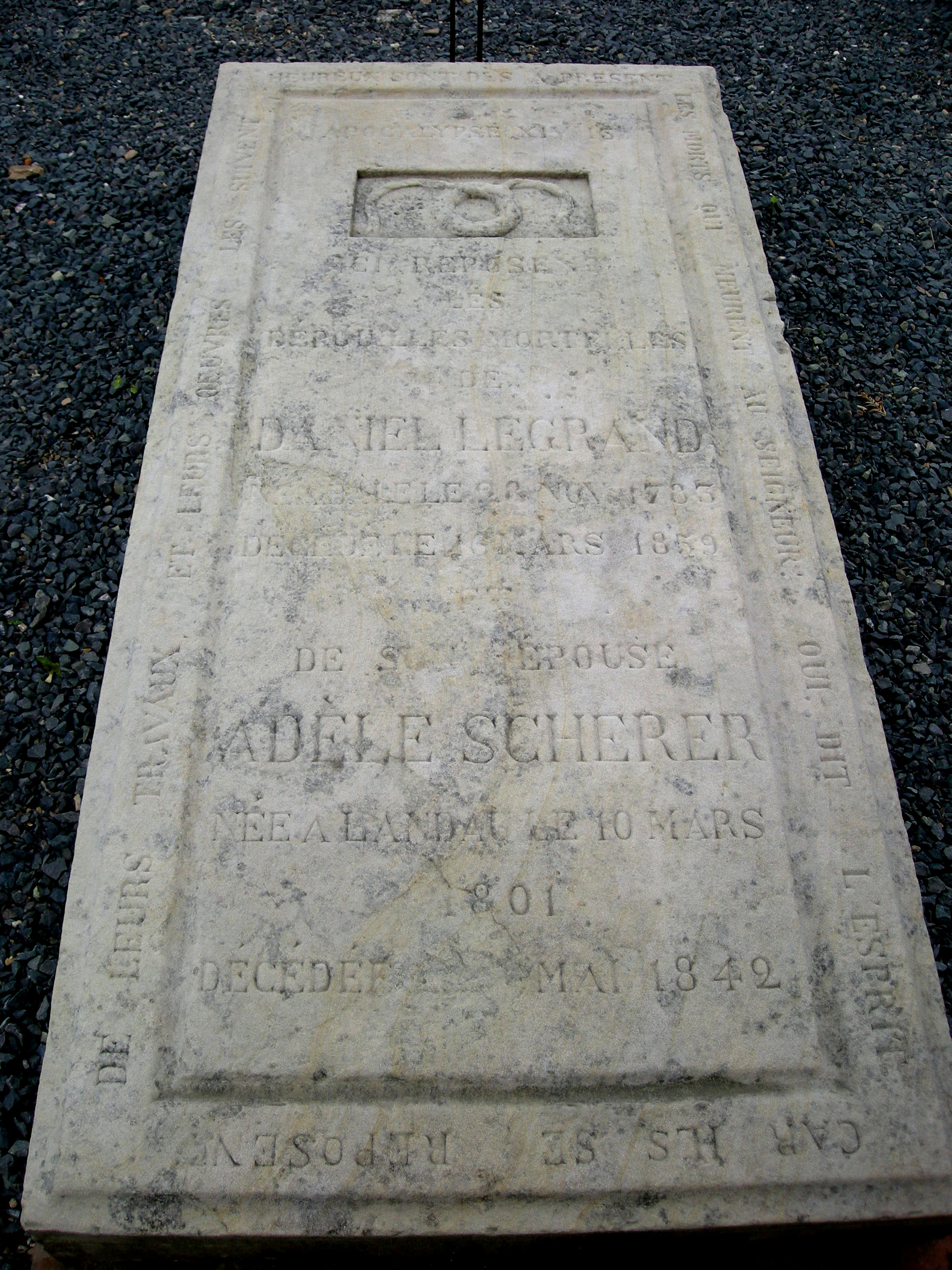 La tombe de Daniel legrand, proche du pasteur Oberlin au cimetière de Fouday (Bas-Rhin)